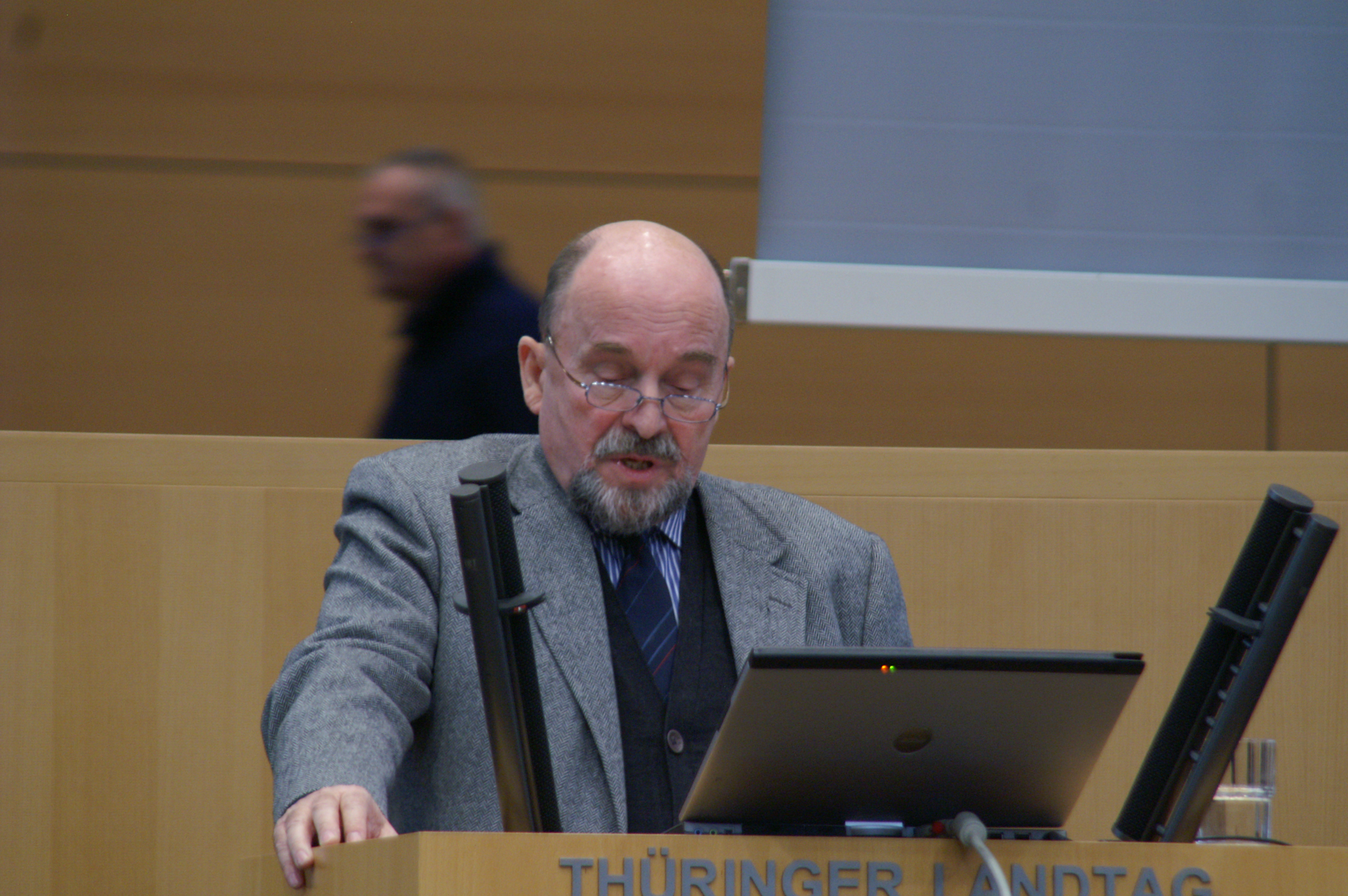 Rainer Eppelmann